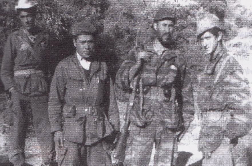 Mostéfa Merarda, fusil a l’épaule entre Ahmed Bekroune, Rahali Boumedien (a gauche) et Rahal (a droite).